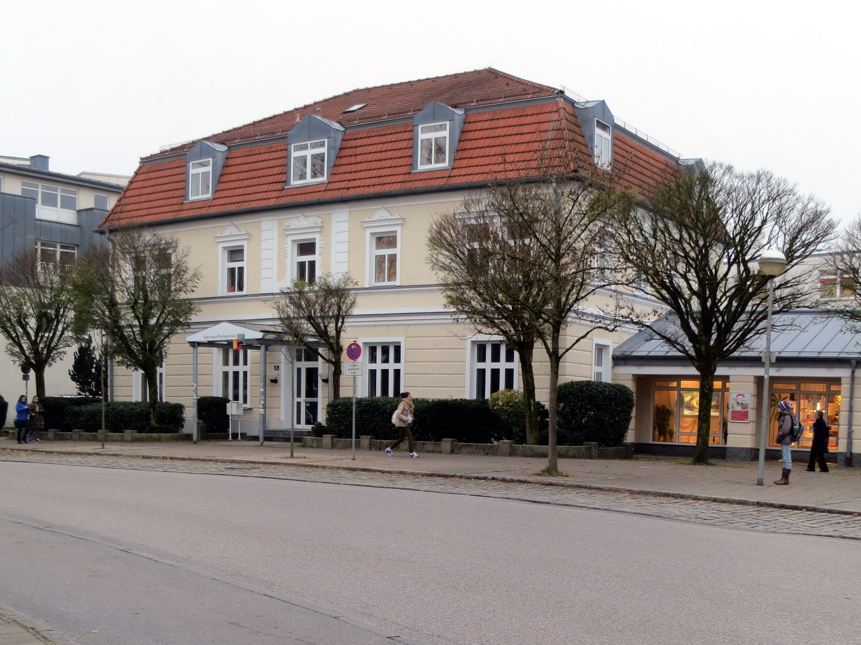 Ehemalige Bahnhofrestauration in Unterhaching - Blick aus NordOst